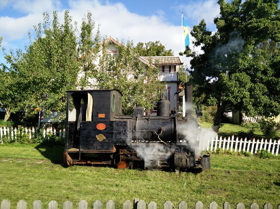 Ångloket Lappen i aktion på Möja Jernvägs 50 års jubileum